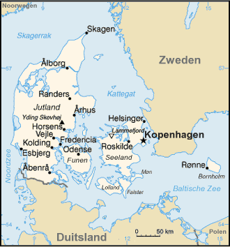 Nederlandse vertaling CIA kaart